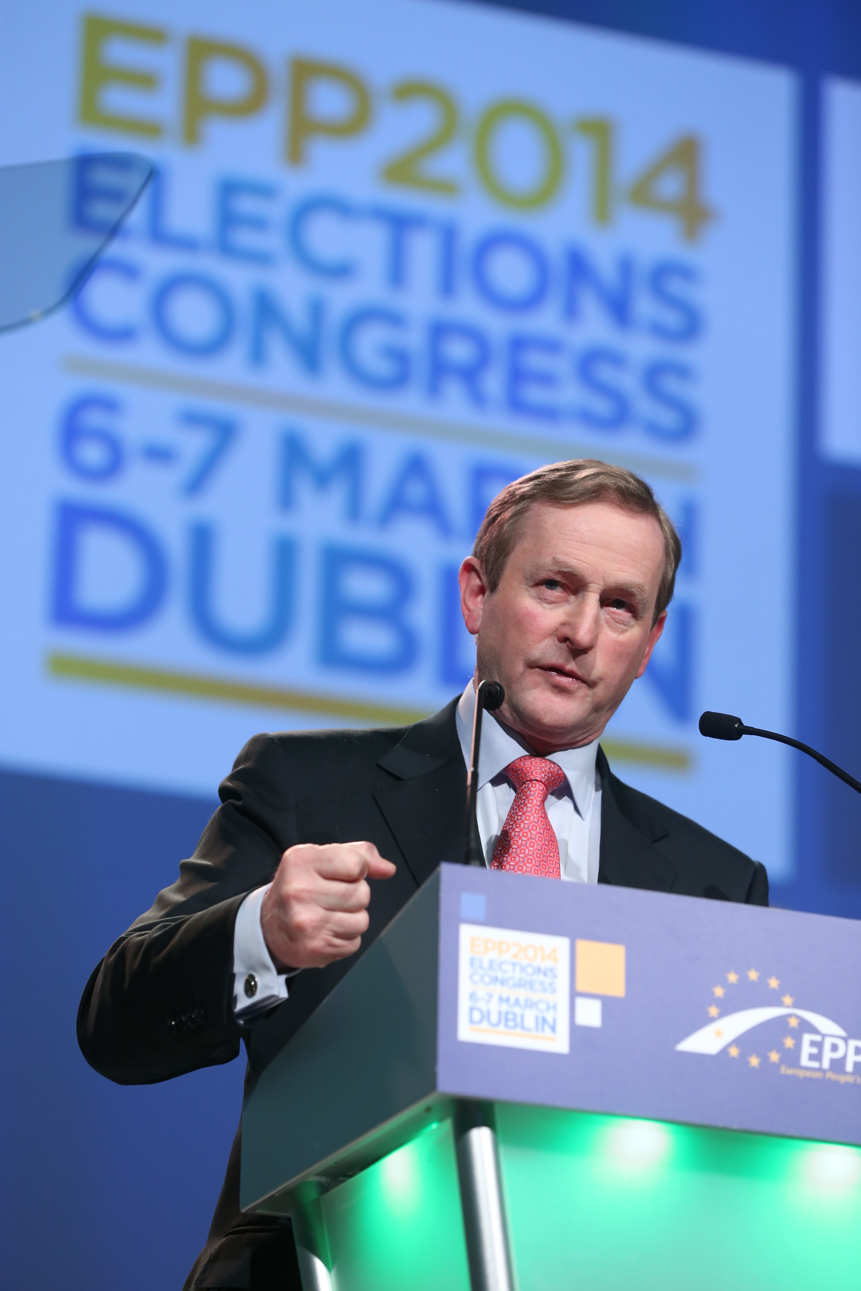 Enda Kenny